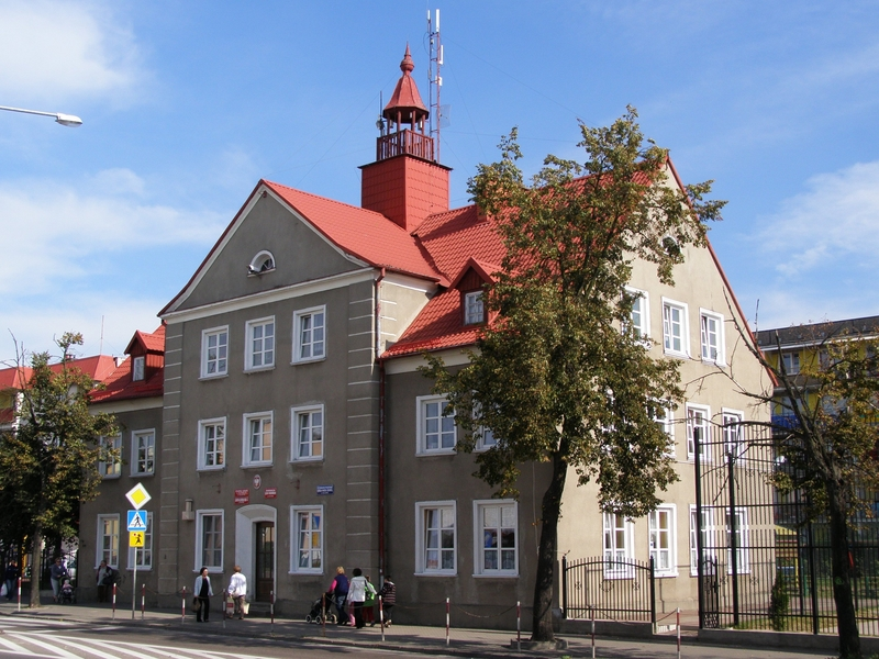 Grajewo - Zespół Szkół Specjalnych przy ul. Ełckiej